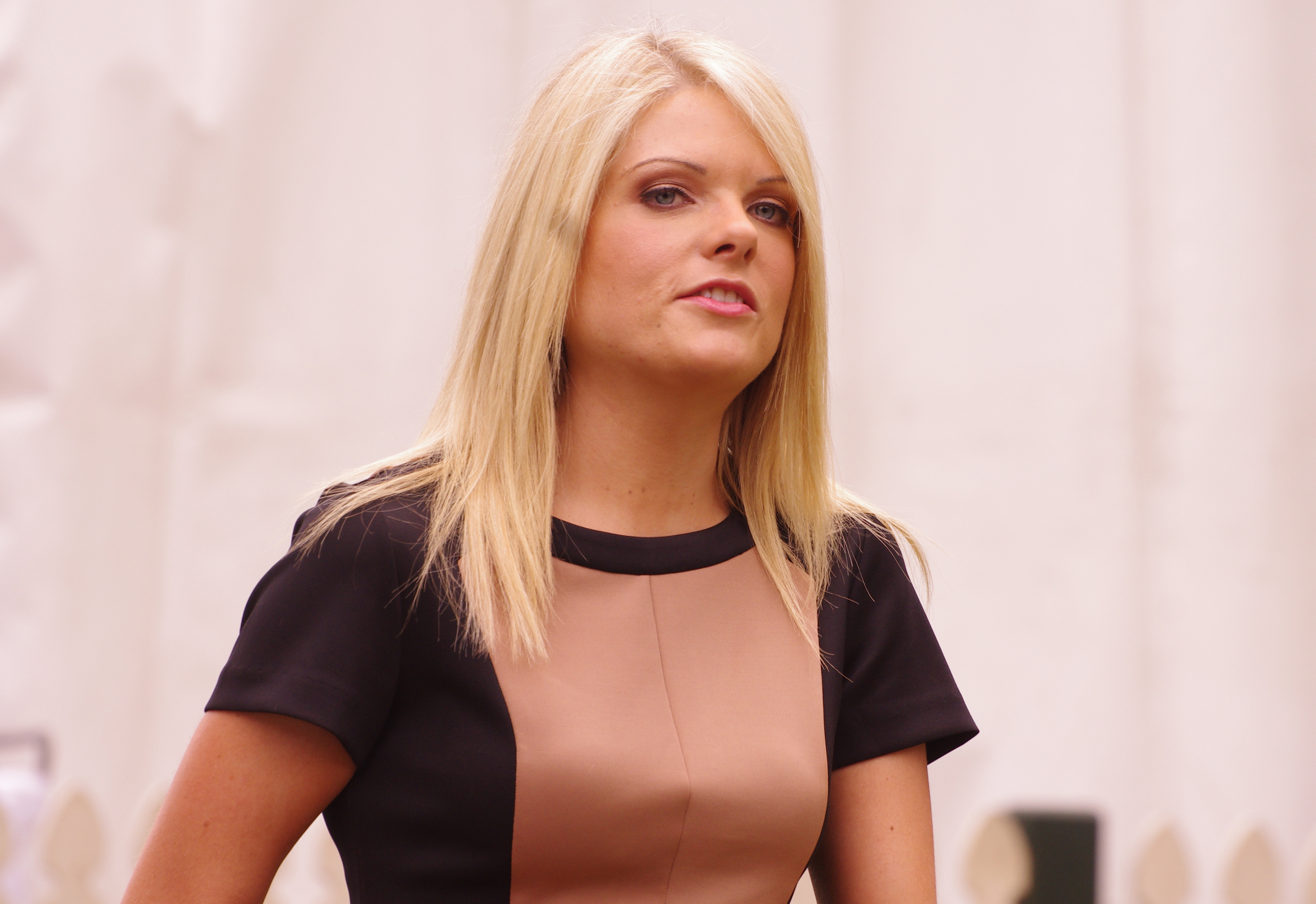 ERIN MOLAN